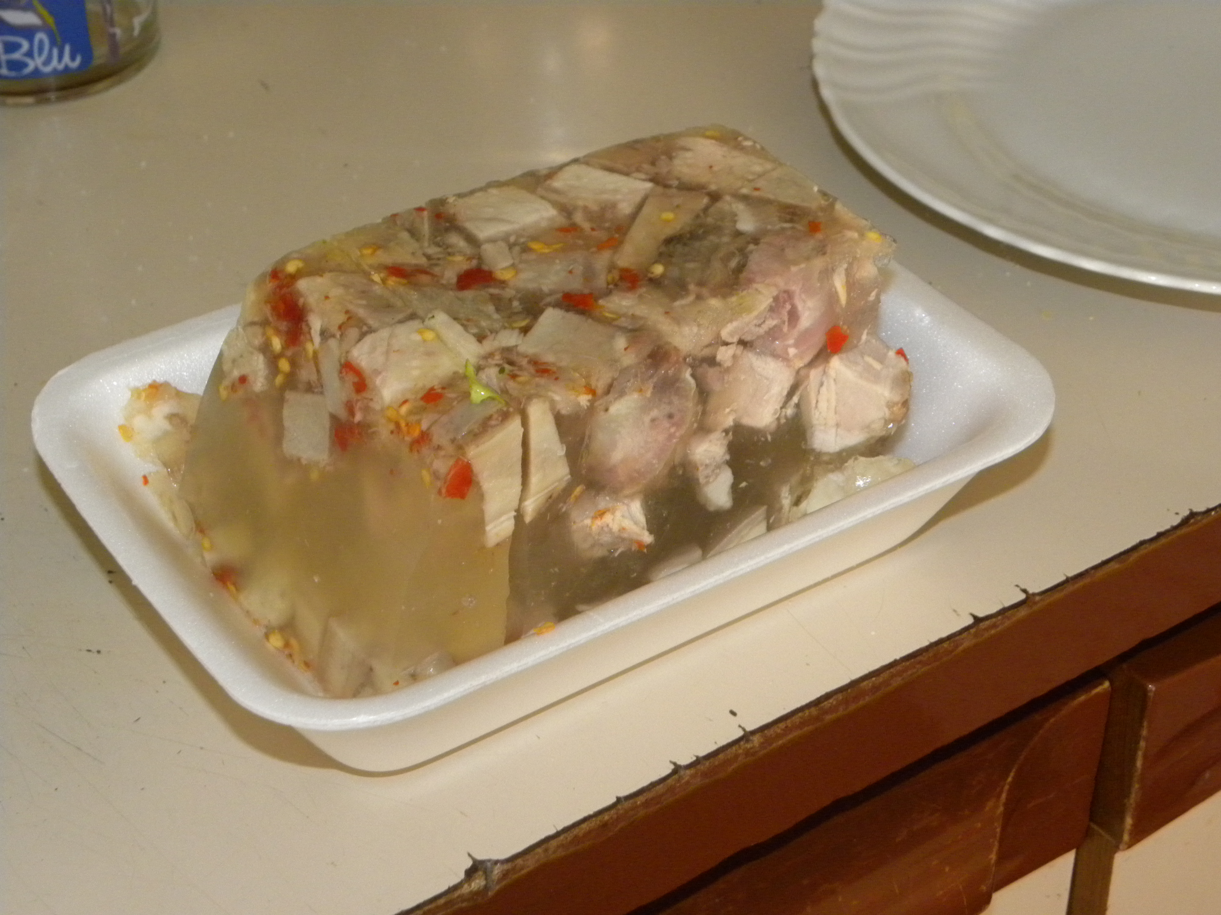 Gelatina di maiale, detta "liatina" in Sicilia. E' un piatto tipico della Sicilia e di alcune zone del sud Italia. Forme simili, senza peperoncino, sono diffuse anche in altri paesi (per esempio Russia)